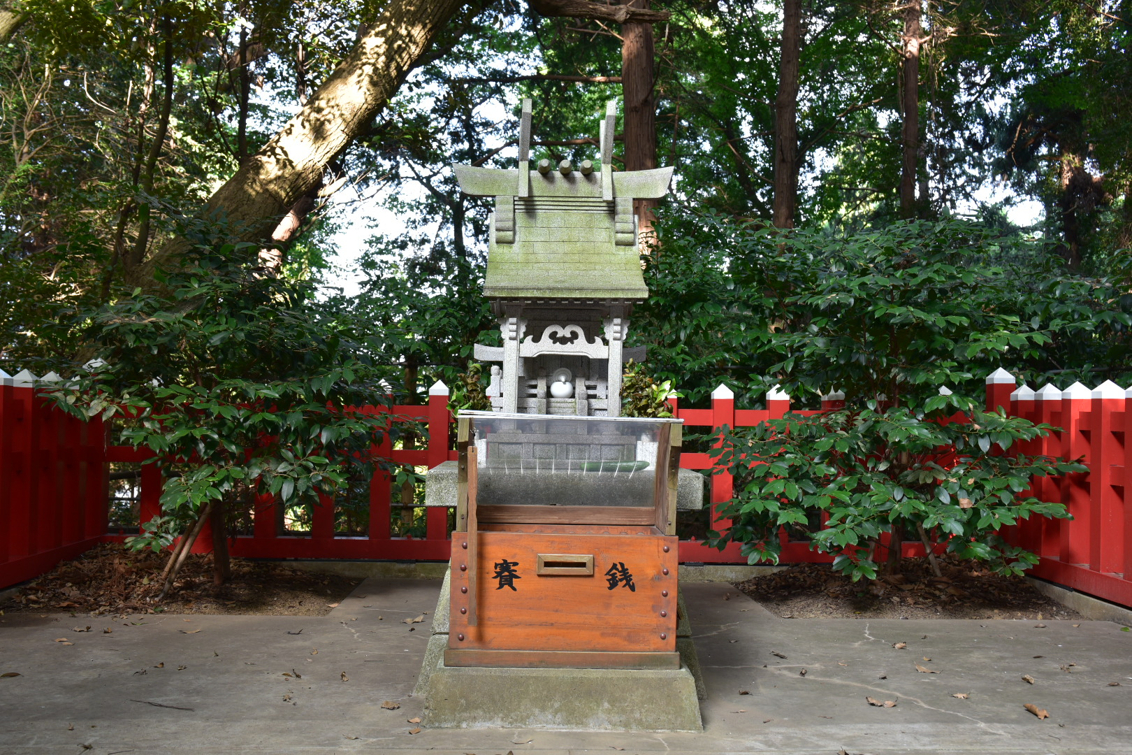 天日津久神社の本殿